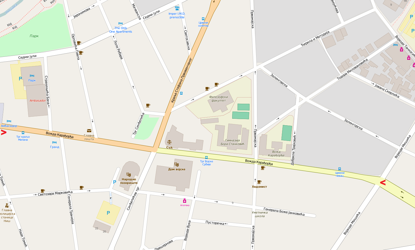 Ulica Vožda Karađorđa na mapi Niša. Crvenom bojom označena je zapadna (levo) i istočna granica ulice (desno).